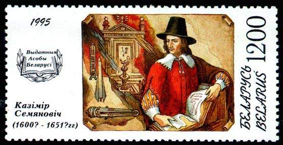 Беларуская (тарашкевіца): Казімер Семяновіч. Белпошта.